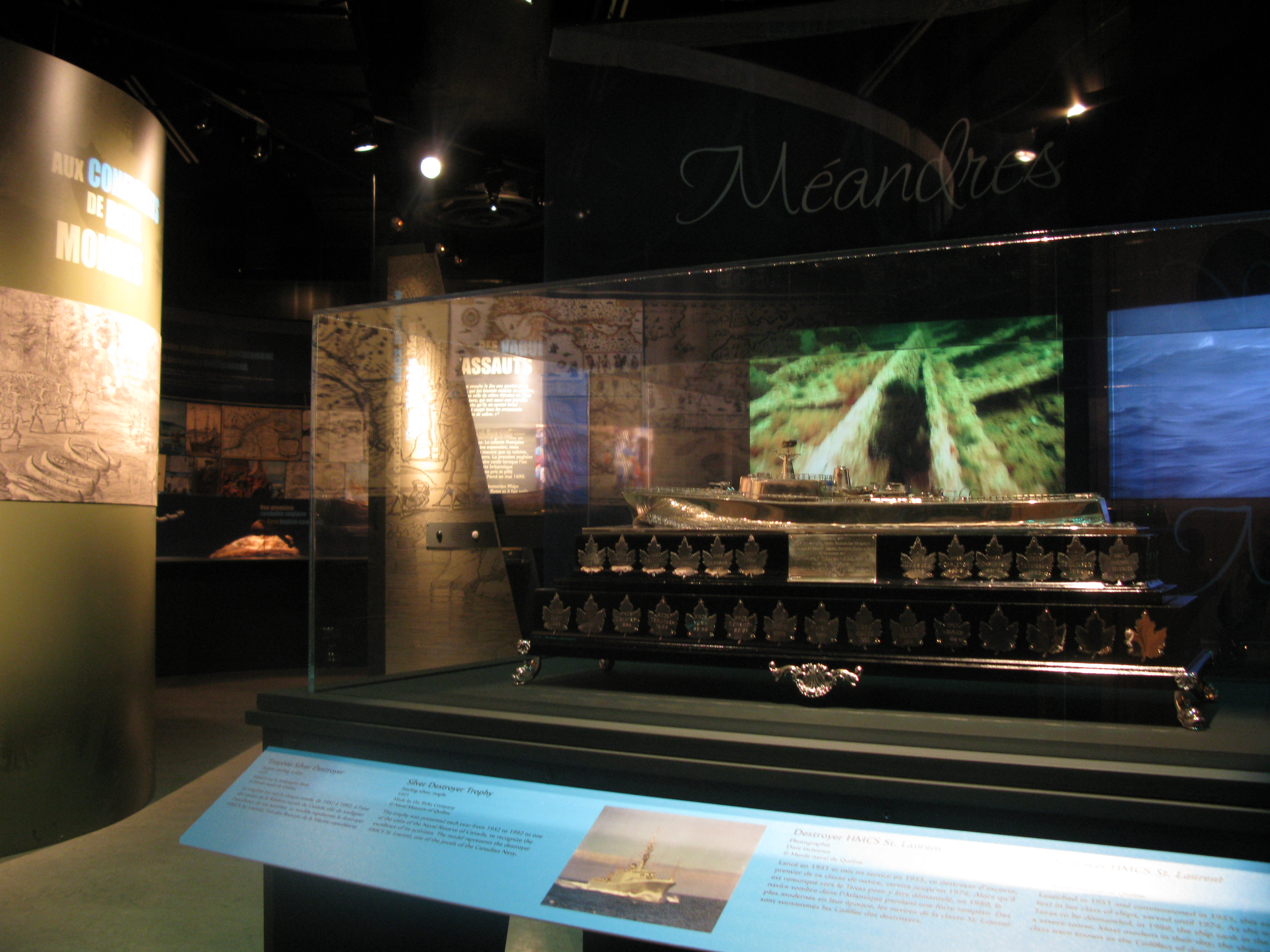 Français cadien: Exposition Méandres, le modèle réduit du HMCS St.Laurent baptisé le Selver destroyer